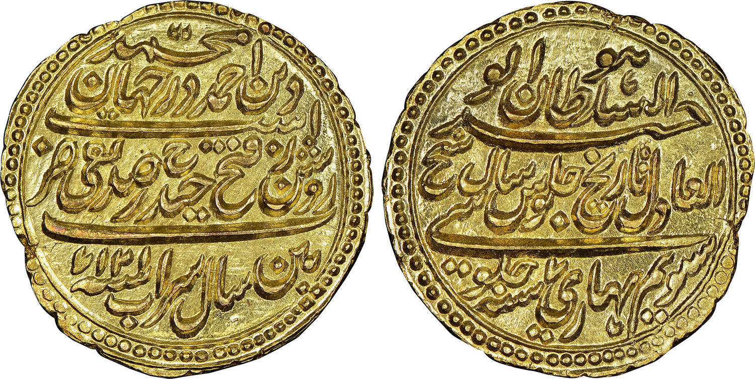 سکه دو پاگودای تیپو سلطان با وزن 10/95 گرم از جنس طلا